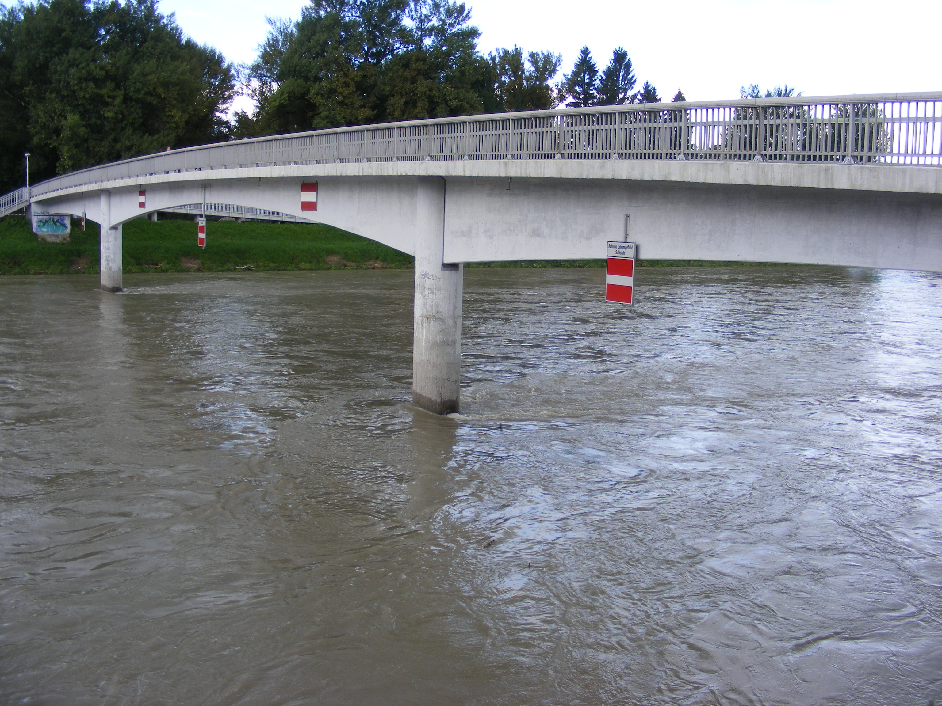 Fußgängerbrücke Pioniersteg in Salzburg